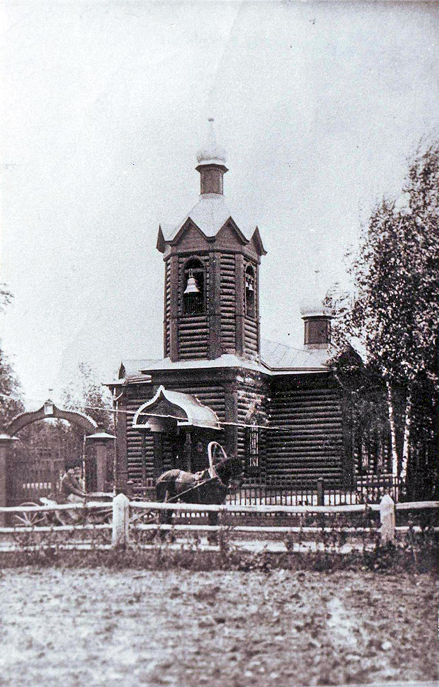 Деревянная церковь Николая Чудотворца в Селиванове Владимирской губернии. Начало ХХ века.